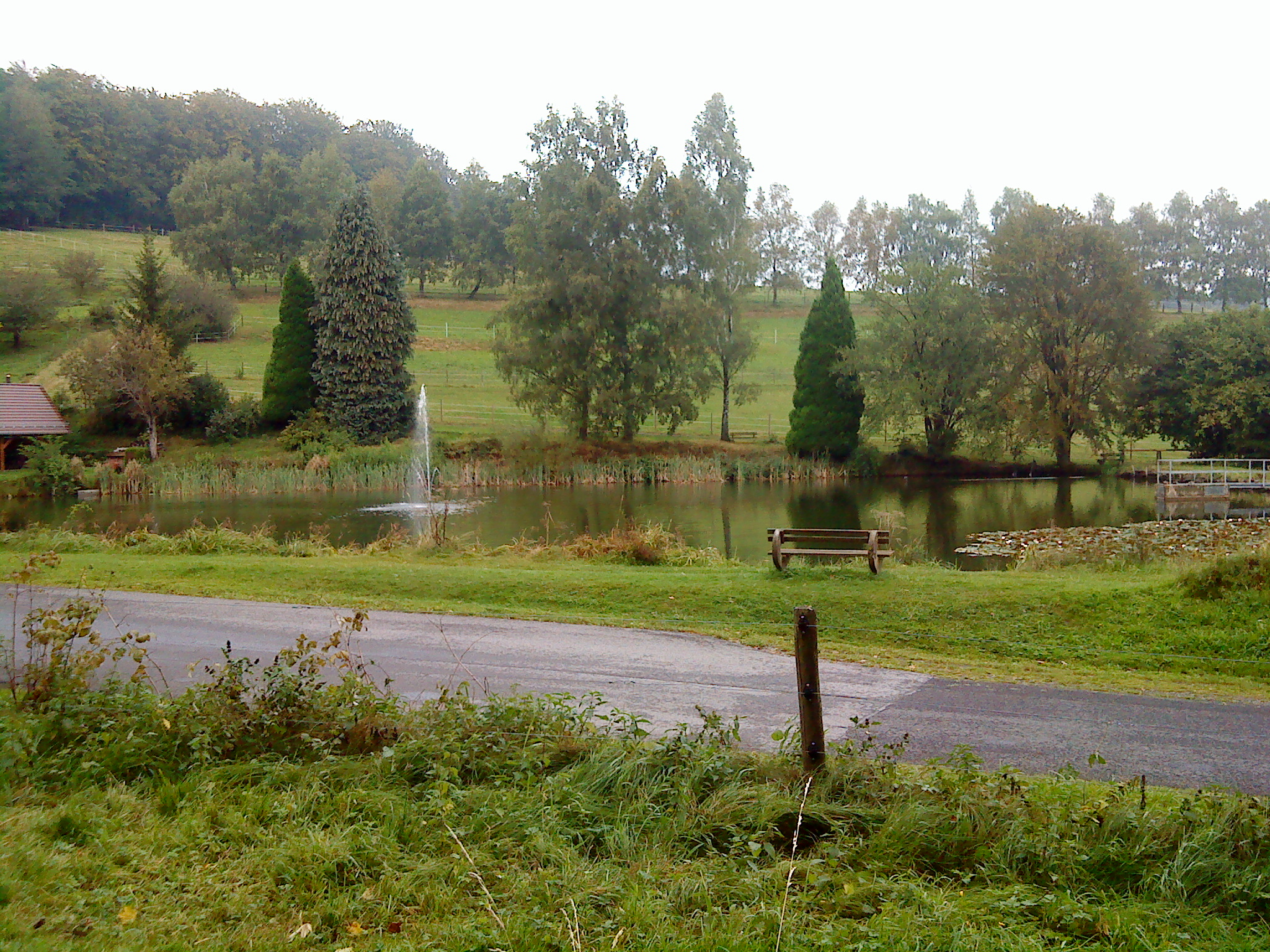 Der Quellweiher des Flörsbaches in Flörsbachtal-Flörsbach